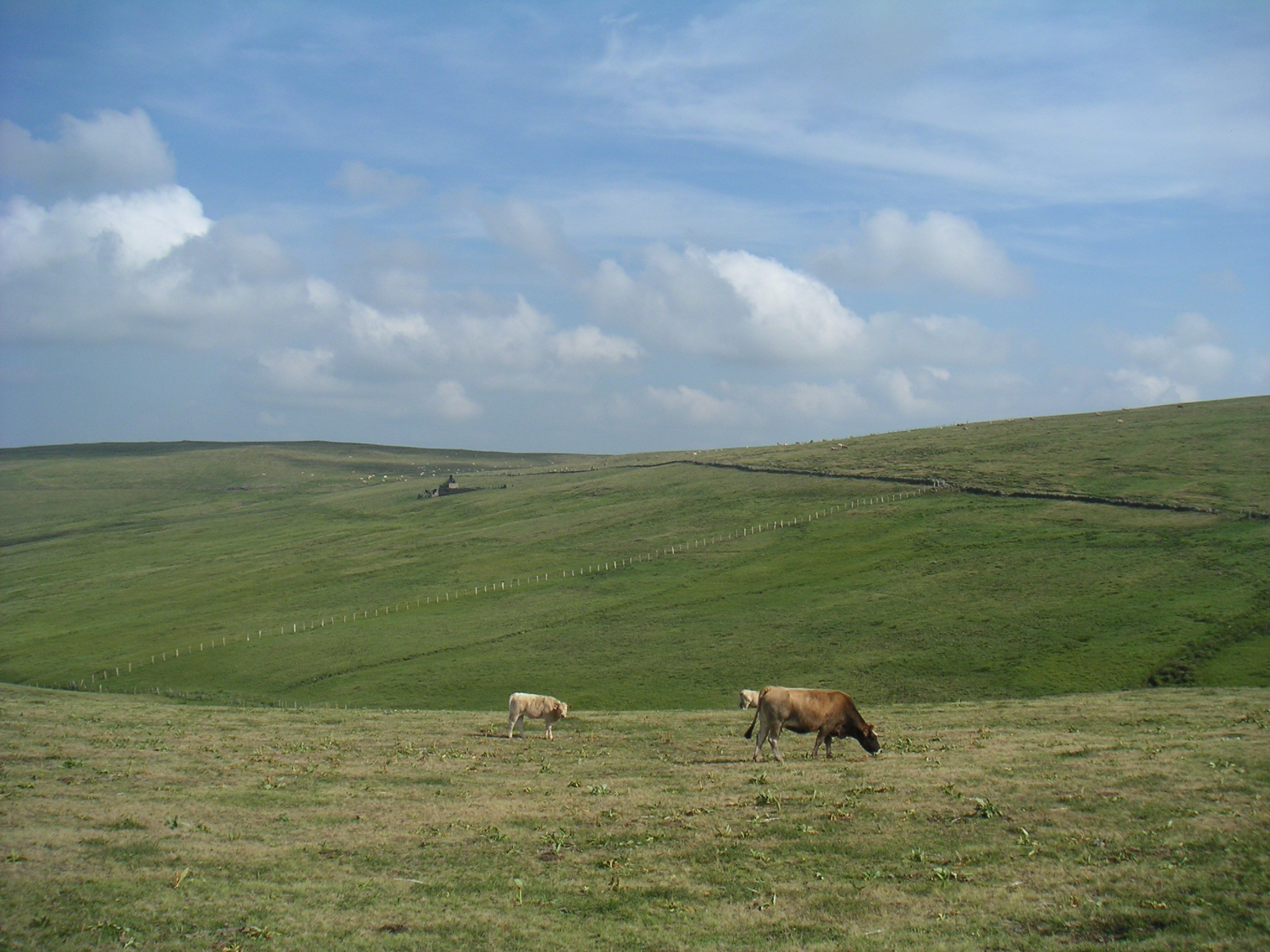 Versant nord-est du Signal de Mailhe-Biau, point culminant (1 469 m) de l'Aubrac, France. Vu depuis le GR 60, à l'ouest du refuge des Rajas.Northeast side of Mailhe-Biau mountain, highest point (1,469 m) of the Aubrac plateau, France. View from the GR 60 footpath, west of the Rajas Alpine hut.